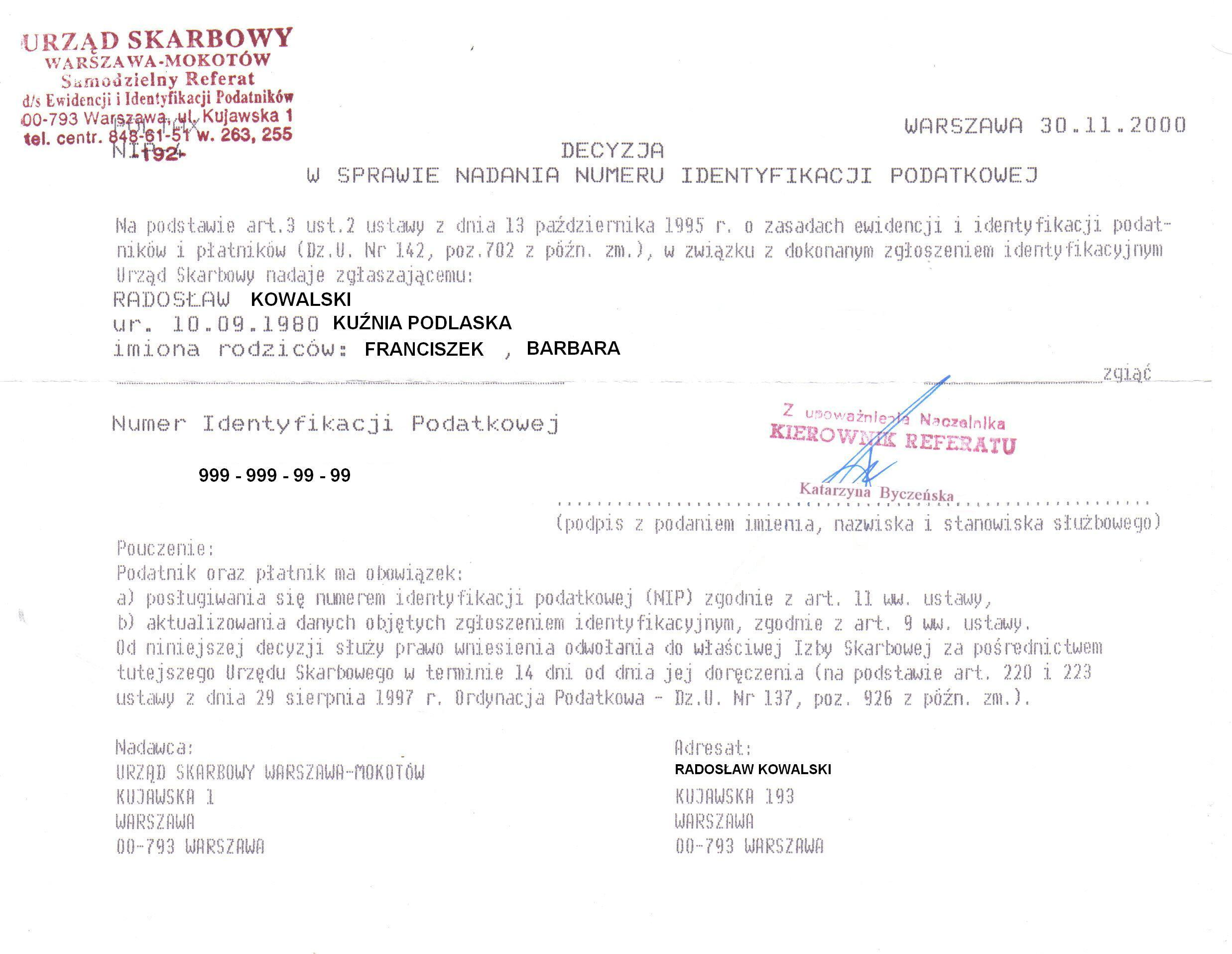 Decyzja Urzędu Skarbowego w sprawie nadania numeru NIP - dane zmieniono.